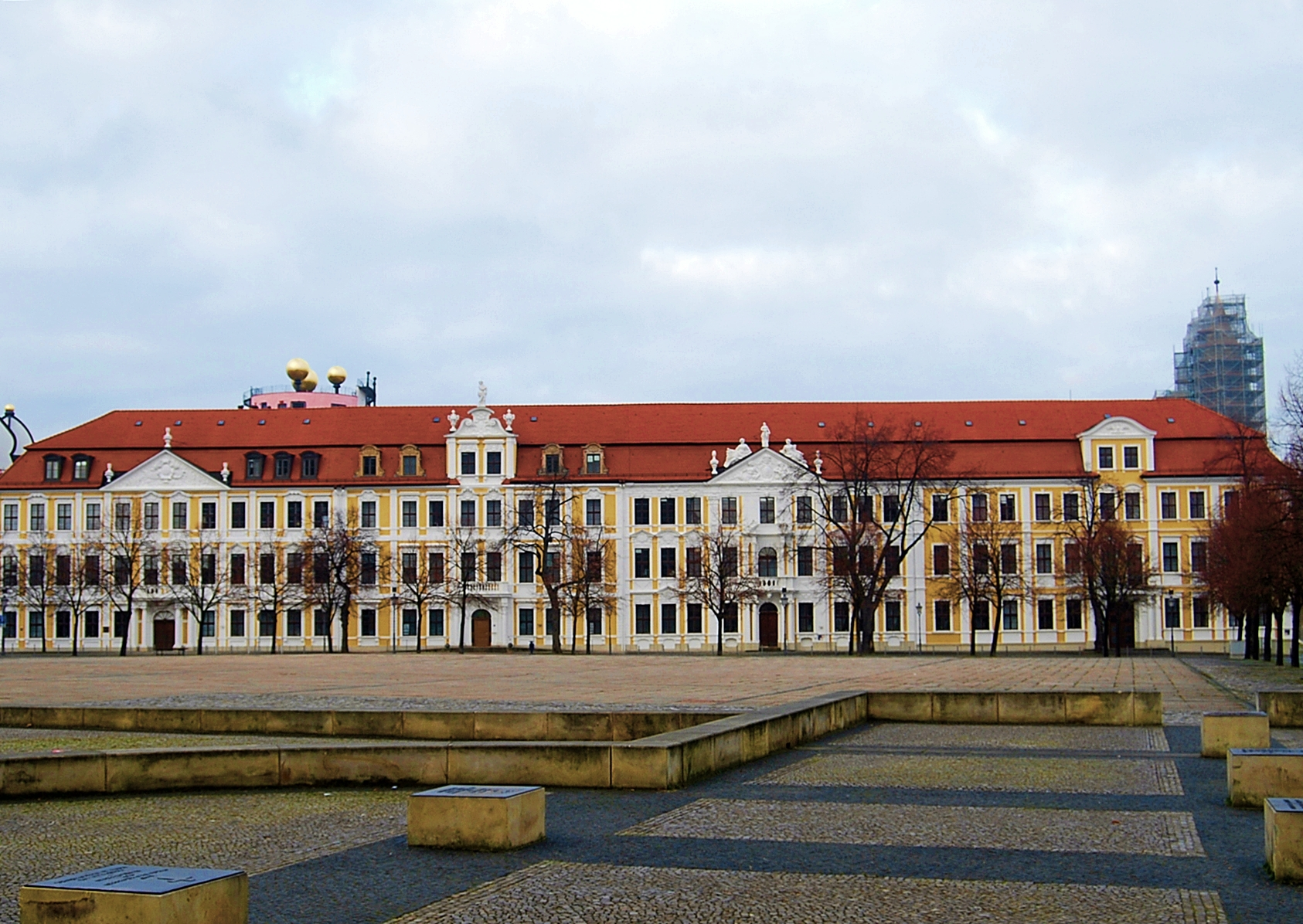 Landtag von Sachsen-Anhalt am Domplatz in Magdeburg